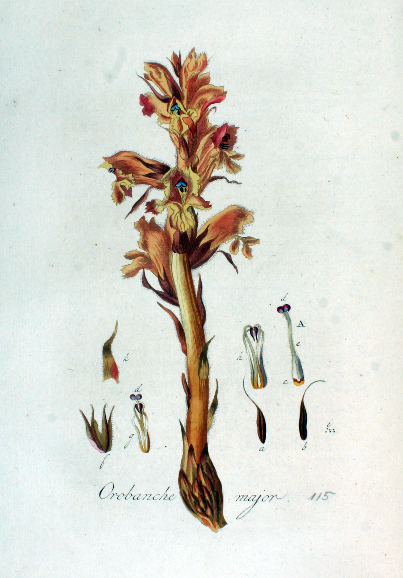 Orobanche elatior Sutton (Syn. Orobanche major auct. non L., nom. rejic. propos.)